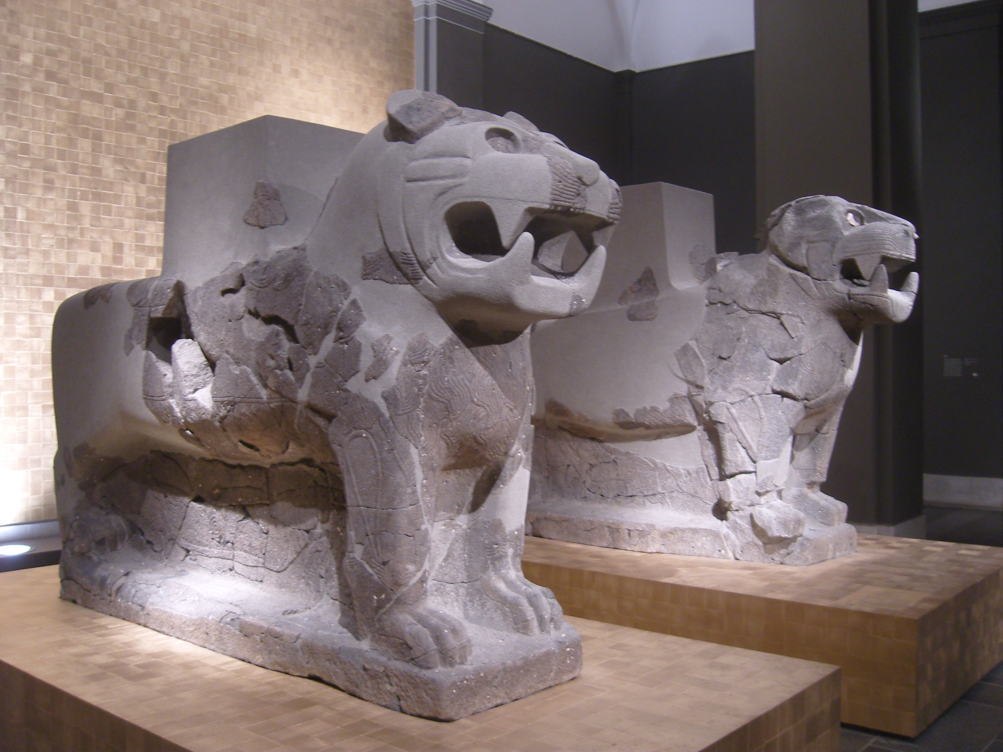 Ausstellung "Die geretteten Götter vom Tell Halaf" im Pergamonmuseum Löwen